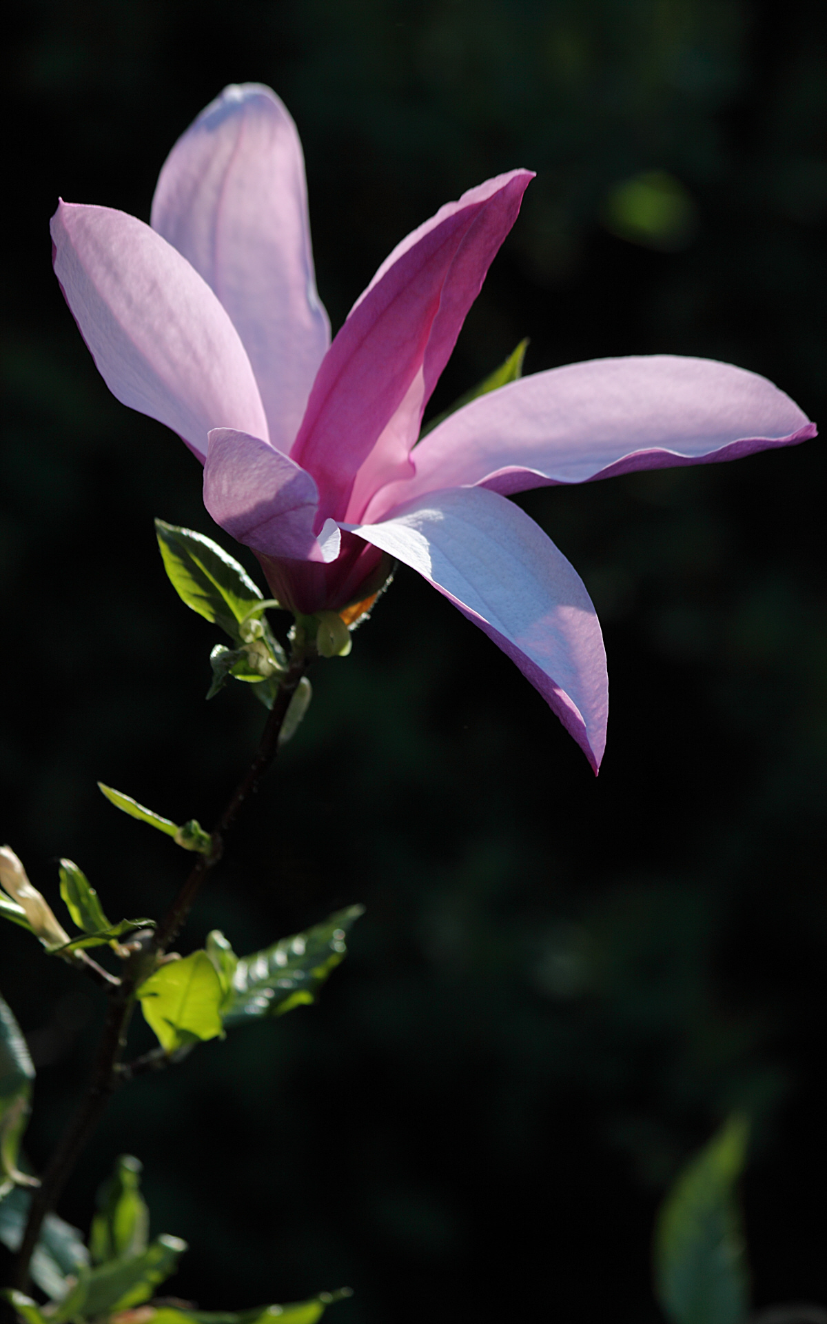 Magnolia liliiflora (Purpur-Magnolie), aufblühend